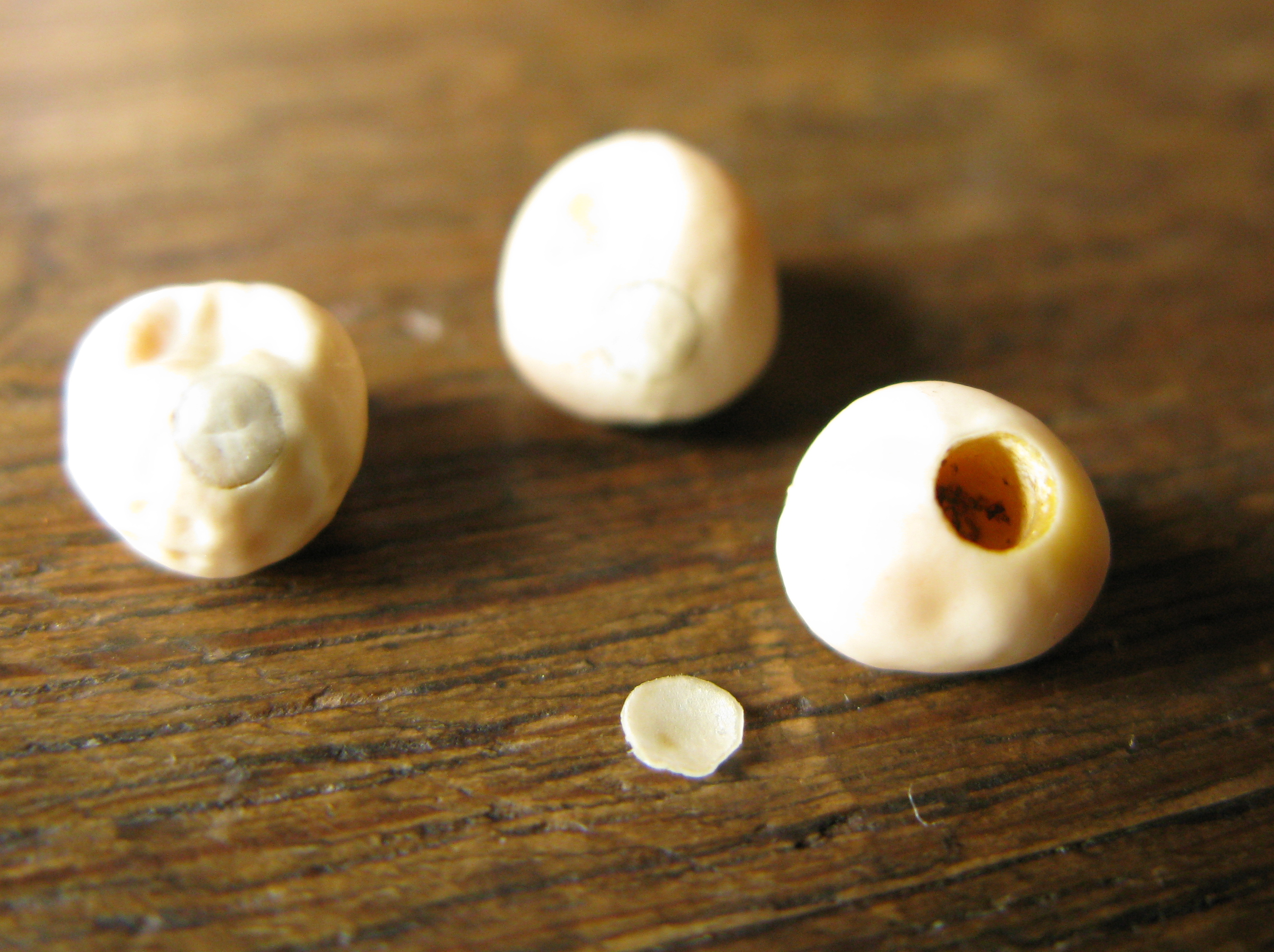 Hamburg